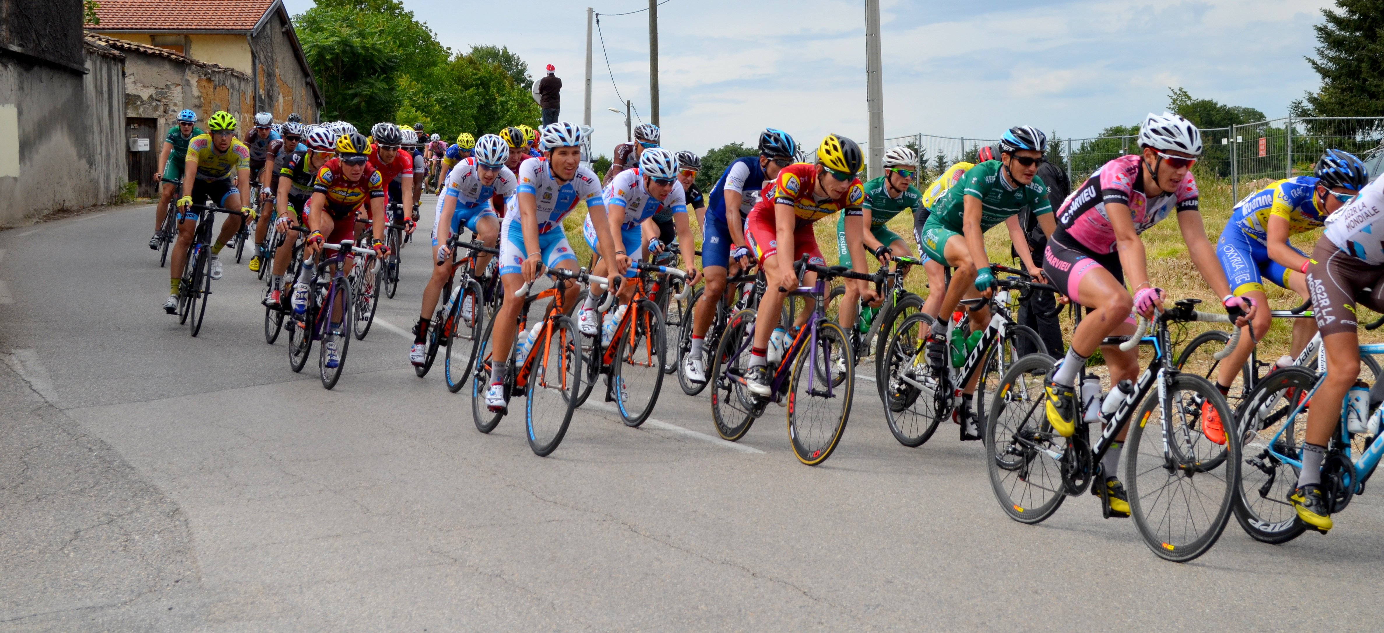 Grand Prix de Charvieu-Chavagneux 2016 : images de l'échauffement, de la course et de l'après-course.